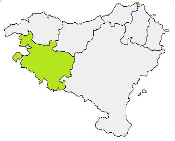 Arabako mapa Euskal Herrian